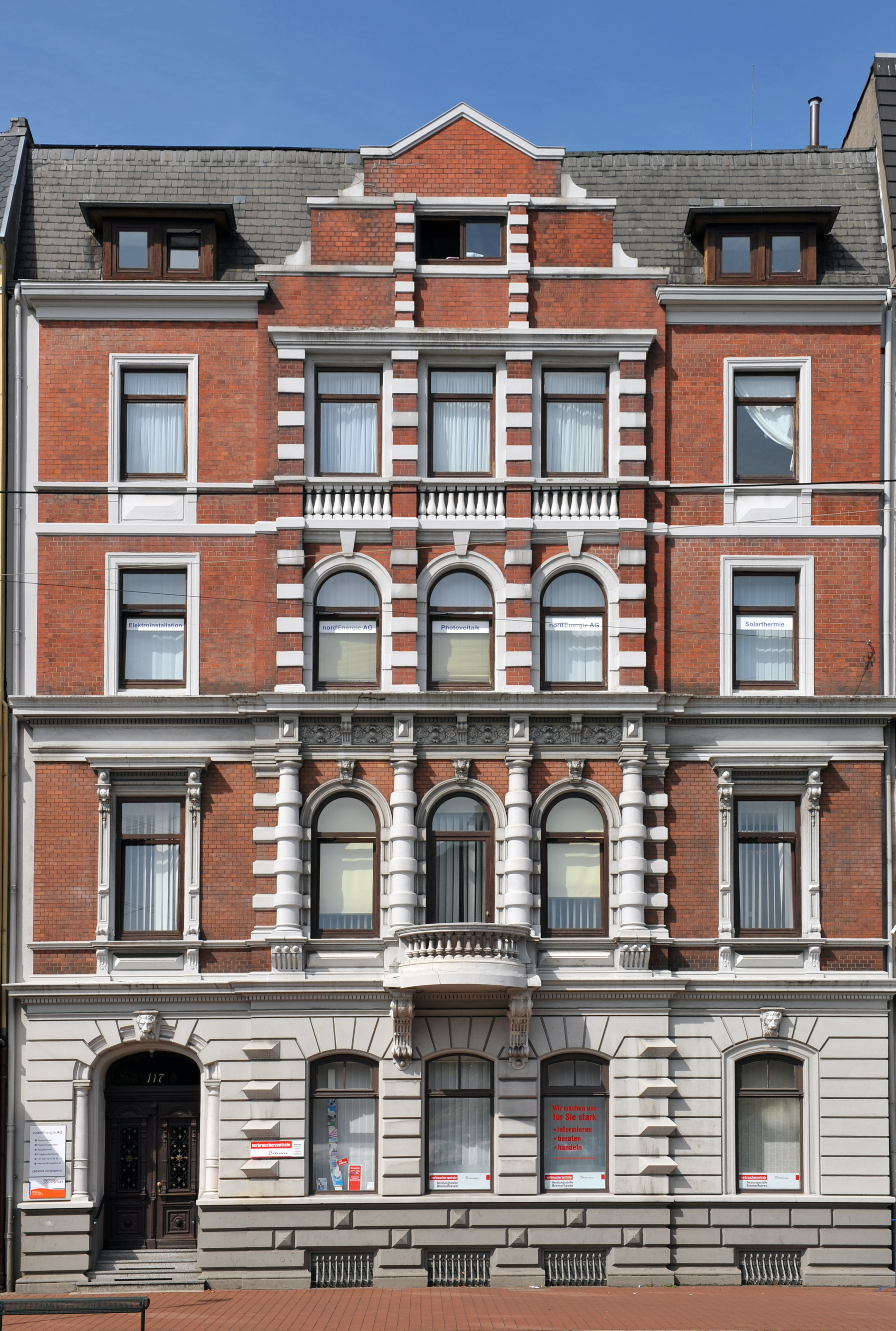 Historical building in Bremerhaven, northern Germany Wohn- und Geschäftshaus, Hafenstraße 117 gebaut 1877 von Architiekt Carl Pogge aus Lehe für Mühlenbesitzer Henrich Mügge. Klassizistischer Eingang mit Gründerzeit-Entree, Paterre mit waagerechter Rustika, Balustradenbalkon im 1. Stock. Vorflur mit Mettlacher Platten, geätzter Windfangtür und 4 Nischen, 2 davon mit Figuren - weibliche Personifizierungen von Handel (links) und Industrie (rechts). Die Figuren sind Serienprodukte von Villeroy & Boch. um 1900 Wechsel des Eigentümers, Nutzung als Bankhaus 1928 Kauf durch die AOK, Aufstockung um 2 Geschosse zur Einrichtung einer Klinik. Auflage der Baubehörde: Erhaltung von Form und Baustil, "...wobei die alte Form nach oben hin sich allmählich an die zeitgenössische Form anpassen soll." seit 19xx? ist im Gebäude die Verbraucherzentrale untergebracht. Das abgebildete Objekt ist ein geschütztes Kulturdenkmal in der Freien Hansestadt Bremen, mit der Nr. 1569 beim Landesamt für Denkmalpflege registriert.